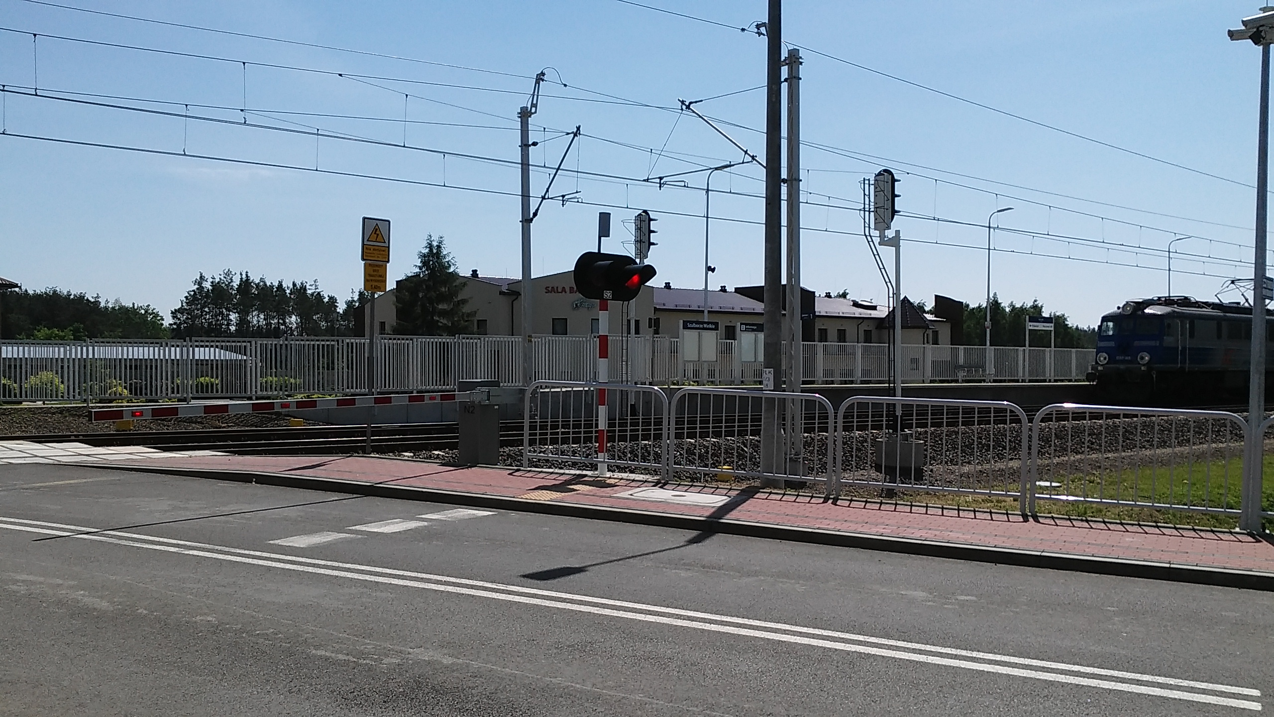 przystanek kolejowy Szulborze Wielkie - przejazd kolejowo-drogowy w ciągu ul. Wyszyńskiego (drogi powiatowej 2618W) z opuszczonymi zaporami, widok od północy; przez przystanek przejeżdża pociąg pospieszny TLK 35104 Branicki relacji Kraków Główny - Gdynia Główna